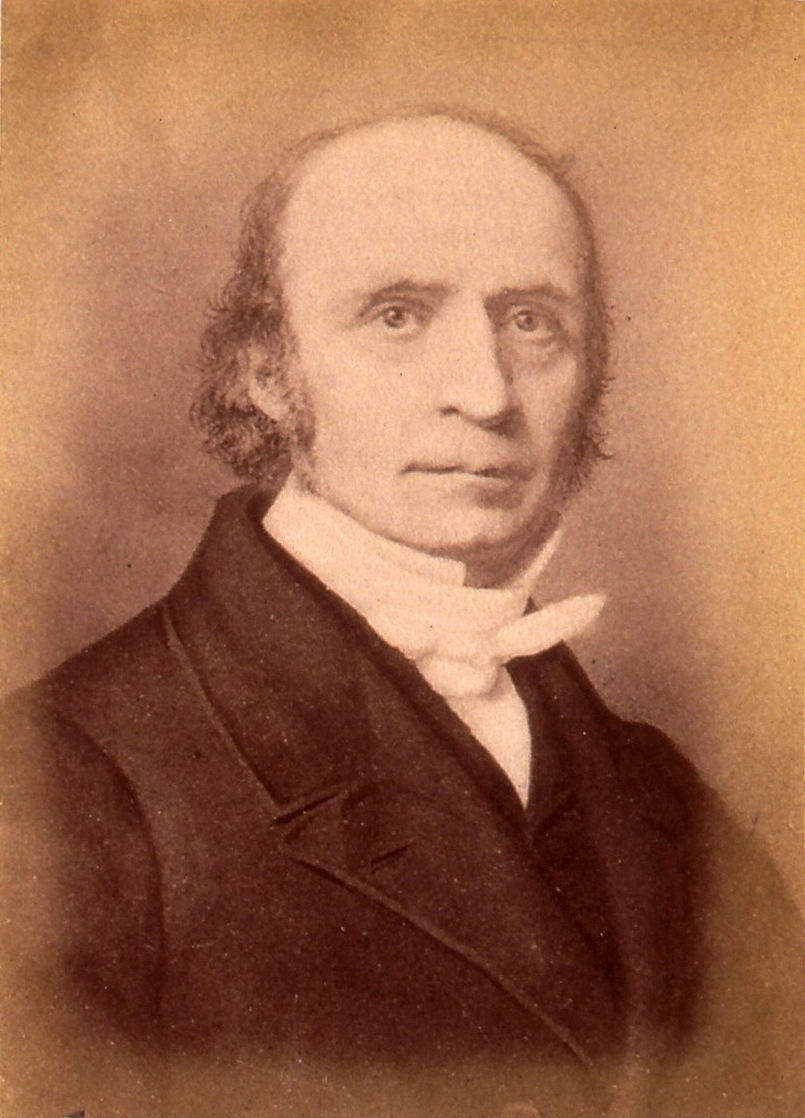 François-Henri Haerter (ou Franz Heinrich Härter en allemand), né à Strasbourg le 17 avril 1797 et mort dans la même ville le 5 août 1874, est un pasteur luthérien, fondateur d'œuvres, notamment des Diaconesses de Strasbourg. Il joua un rôle de premier plan dans le réveil du piétisme en Alsace